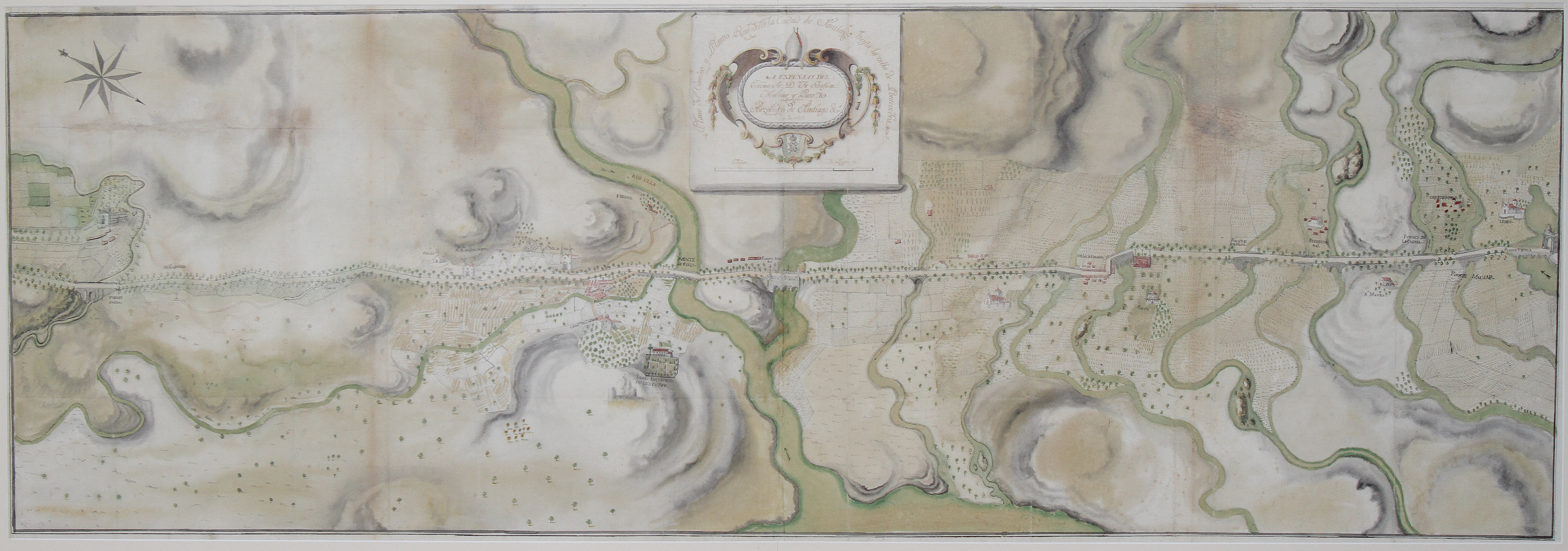 Plano del Camino y Plantío Real desde la Ciudad de Santiago hasta la villa de PontevedraA expensas del Excmo. Sr. D. Fr. Sebastián Malvar y Pinto Arzobispo de Santiago